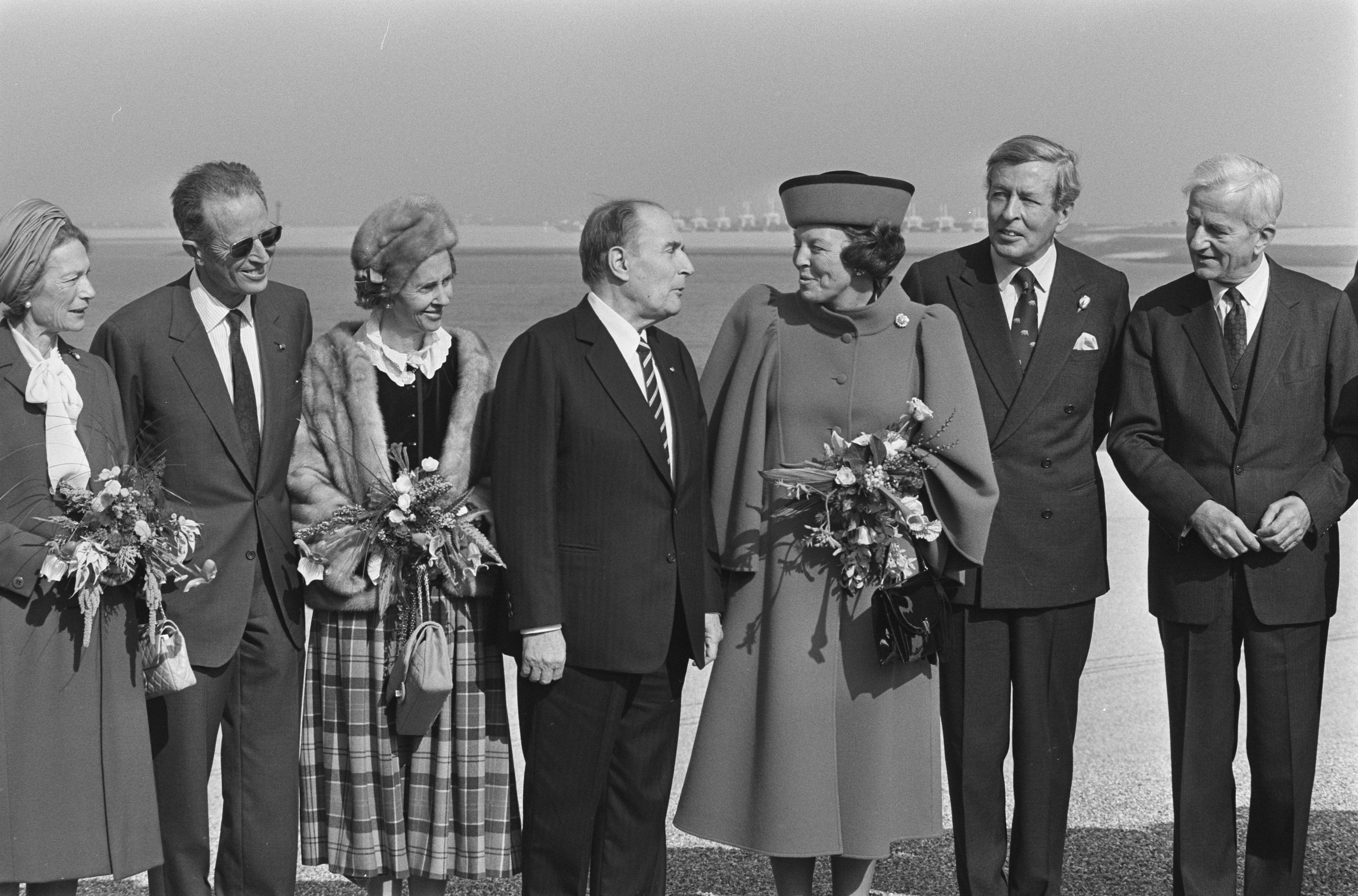 Collectie / Archief : Fotocollectie Anefo Reportage / Serie : [ onbekend ] Beschrijving : In gebruikstelling Oosterscheldedam in aanwezigheid vele gasten, waarmee Deltawerken voltooid zijn; vlnr: Boudewijn, Fabiola, Mitterrand, Beatrix, Claus, v. Datum : 4 oktober 1986 Trefwoorden : DELTAWERKEN, GASTEN Persoonsnaam : Beatrix, prinses, Boudewijn, Claus, prins, Fabiola, koningin van België, Mitterrand, François, V. Weiszacker Fotograaf : Croes, Rob C. / Anefo Auteursrechthebbende : Nationaal Archief Materiaalsoort : Negatief (zwart/wit) Nummer archiefinventaris : bekijk toegang 2.24.01.05 Bestanddeelnummer : 933-7794